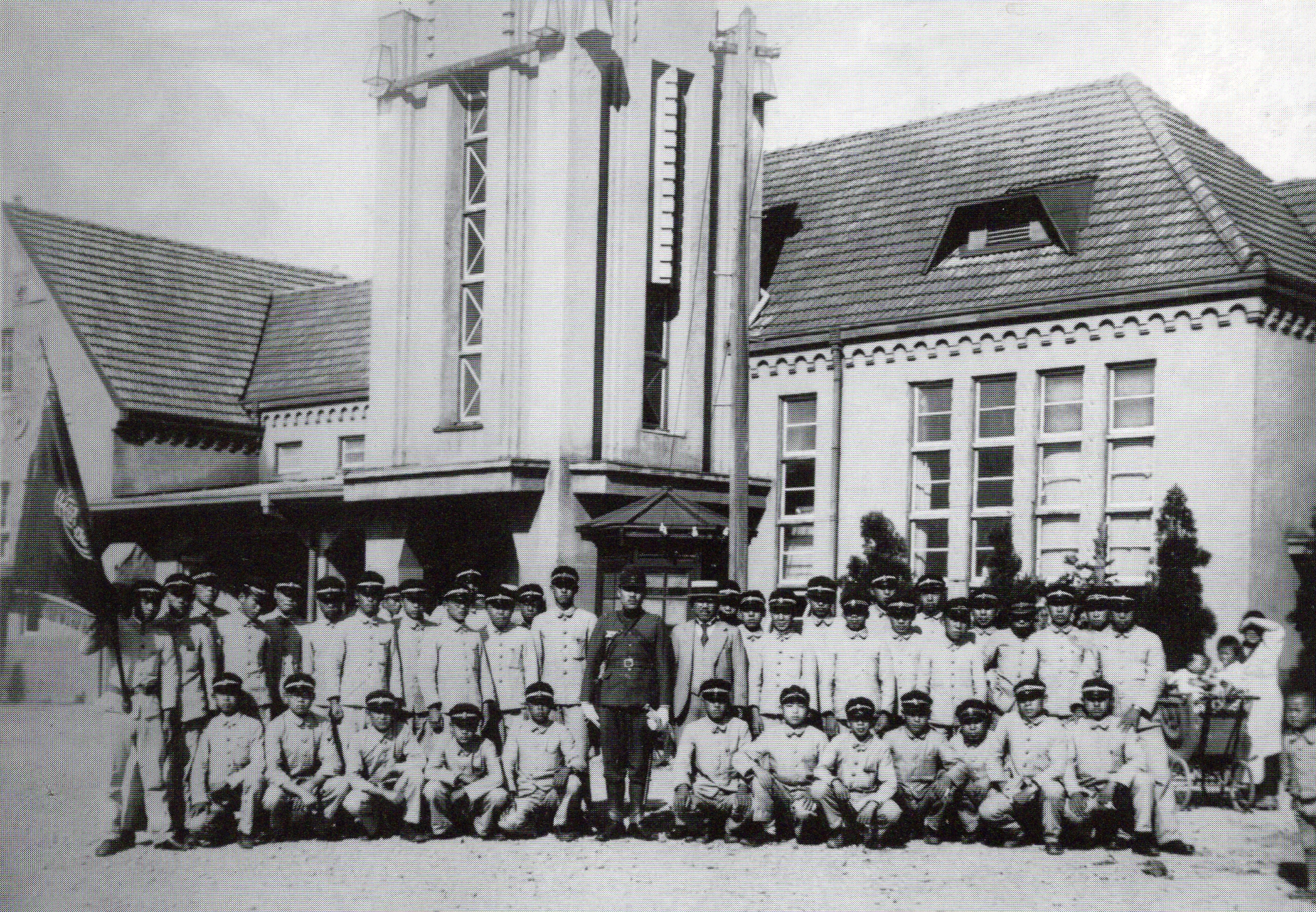 西尾駅。1939年撮影。